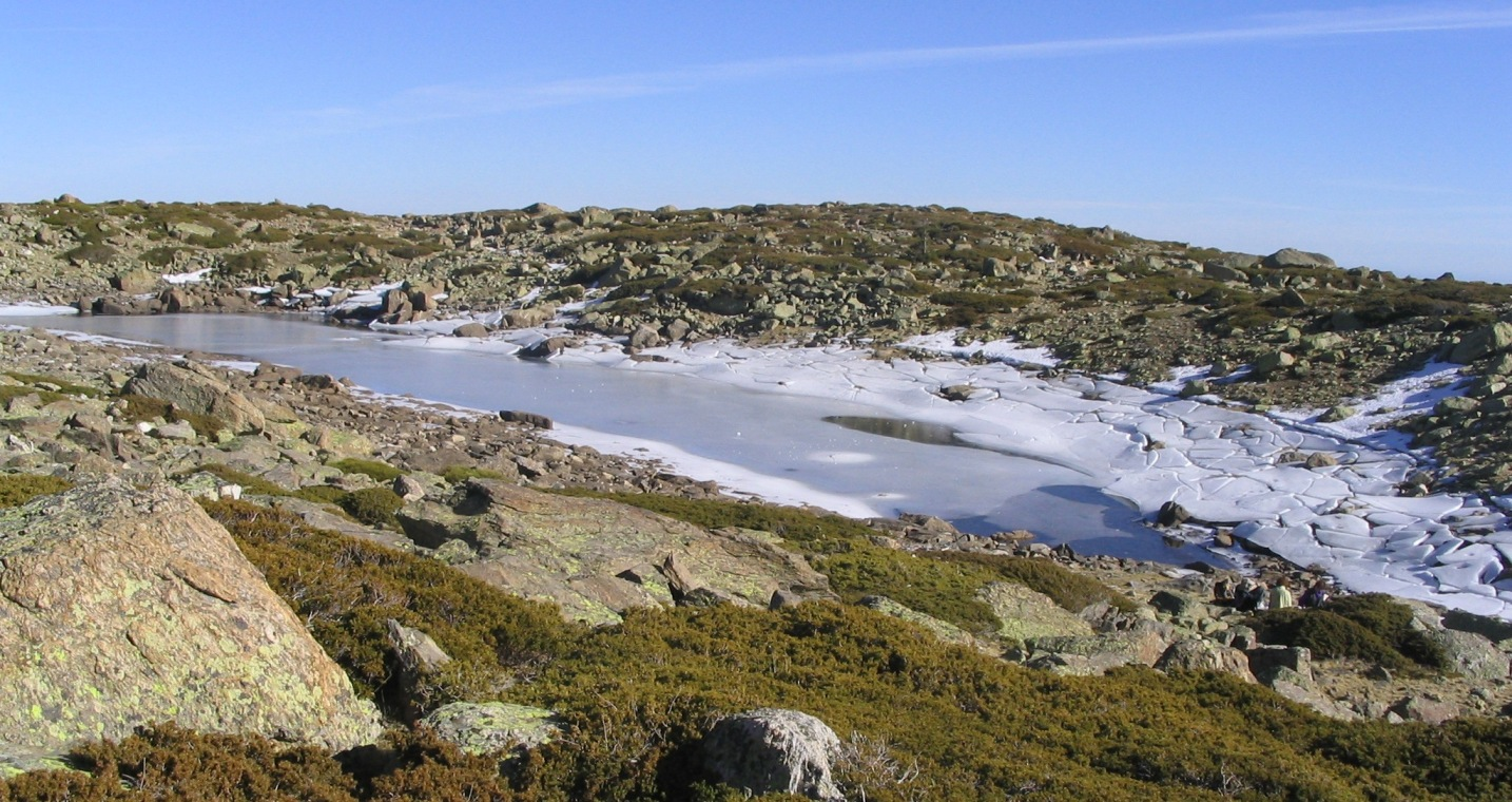 Laguna de los Claveles, perteneciente a la Sierra de Guadarrama (España).